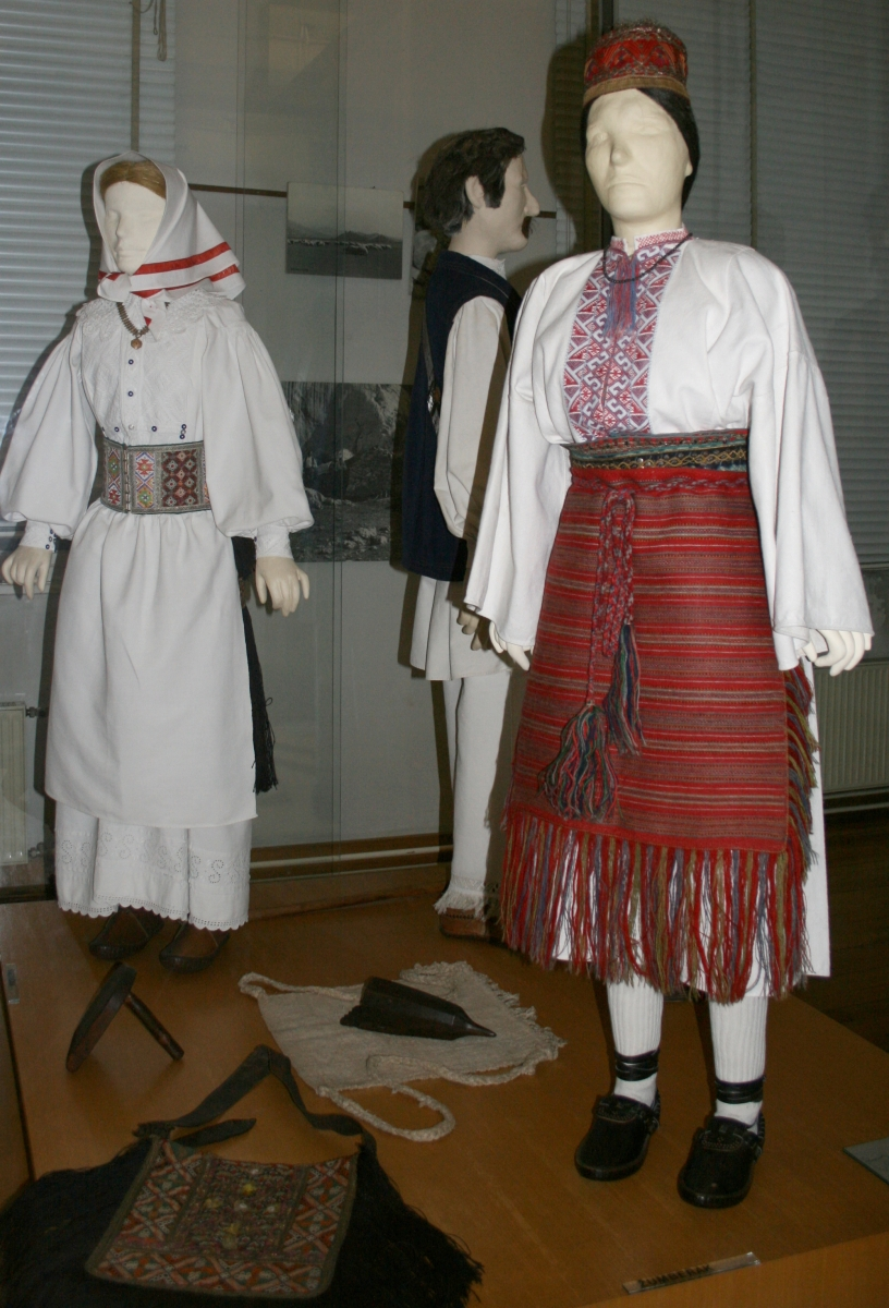 snimljeno tijekom Noći muzeja u Etnografskom muzeju u Zagrebu